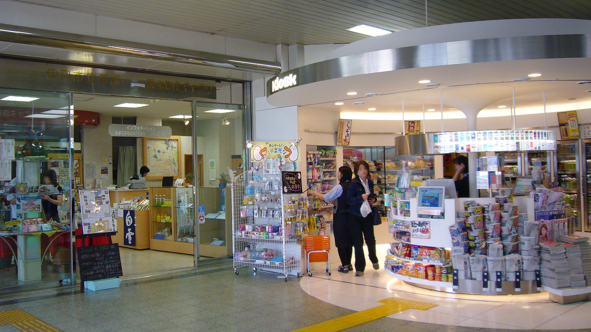 JR Itami Station in Itami, Japan